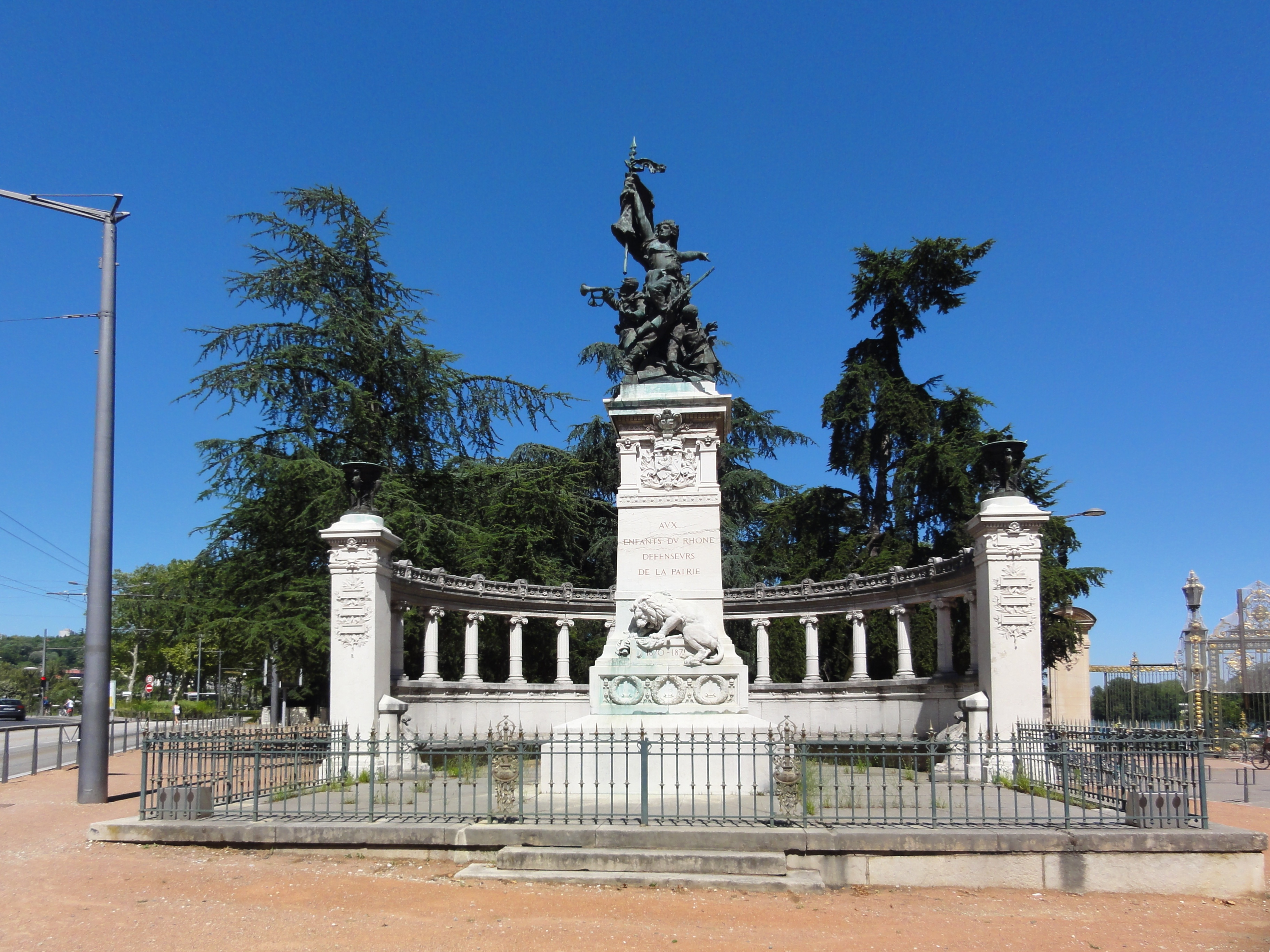 Monument aux morts - Guerre de 1870-71 - Parc de la Tête d'Or (Lyon-France)